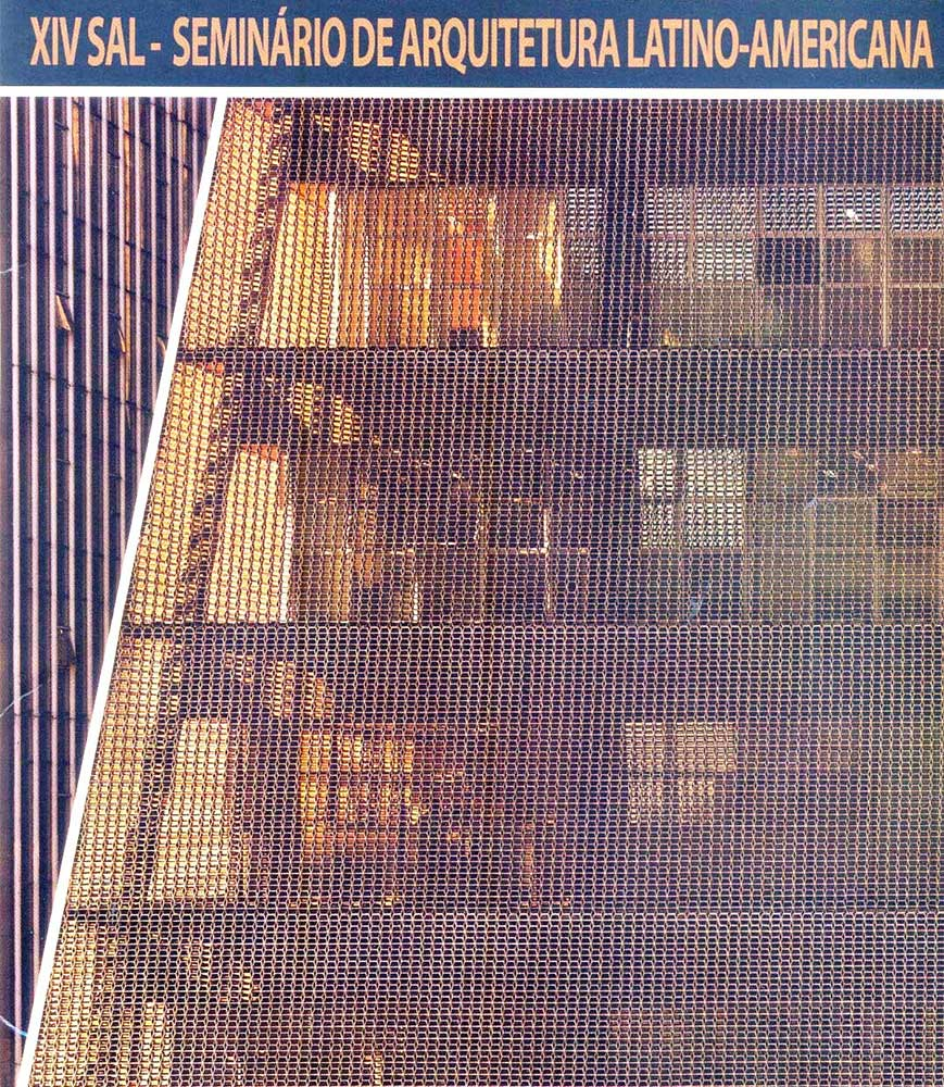 Portada del programa perteneciente al Seminario de Arquitectura Latinoamericana XIV, realizado en Campinas (Brasil) en el año 2009